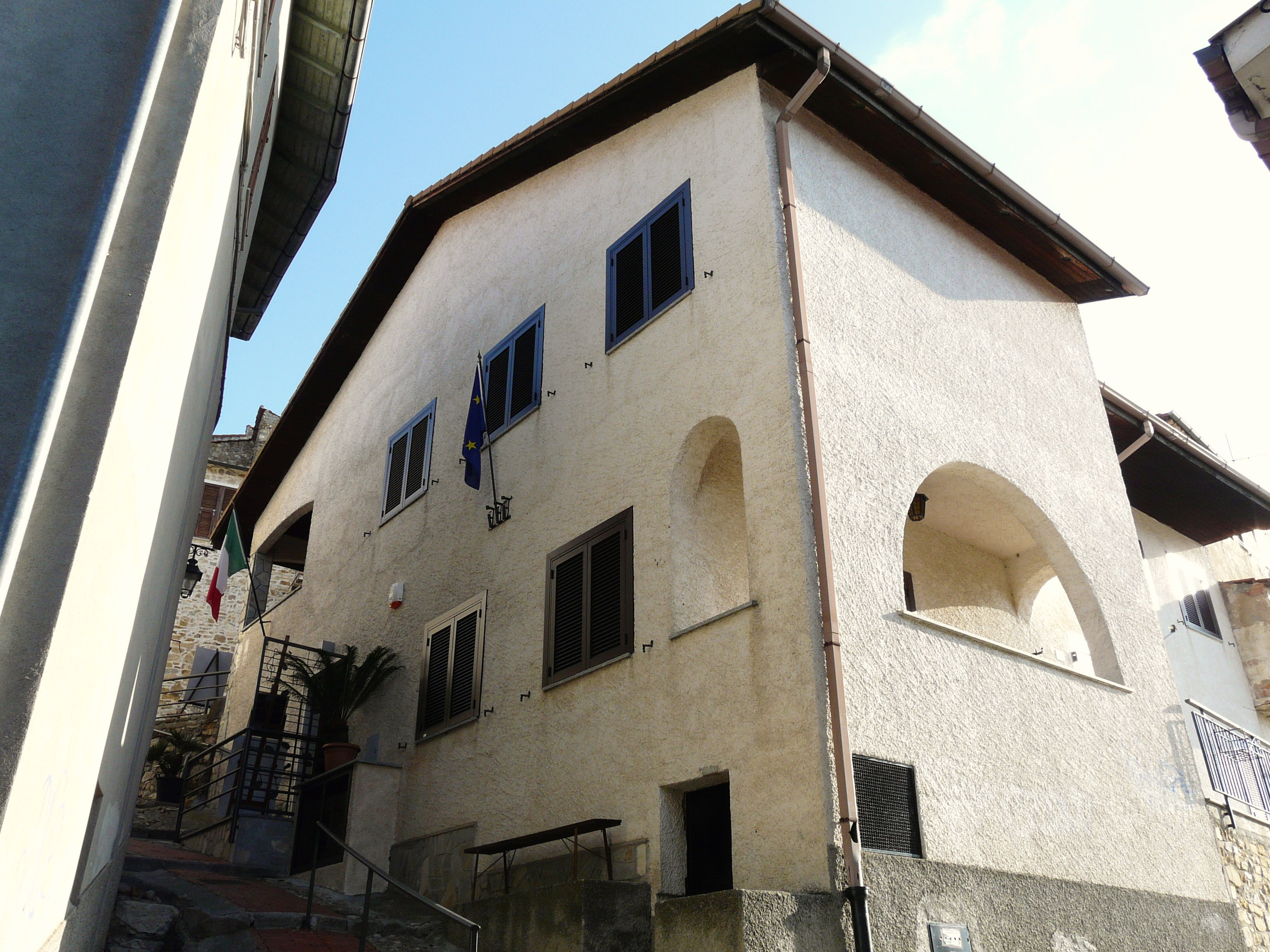 Municipio di Seborga, Liguria, Italia